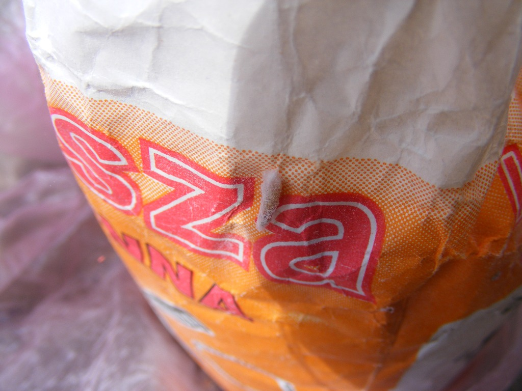 Mól spożywczy - poczwarka na torebce kaszy manny.